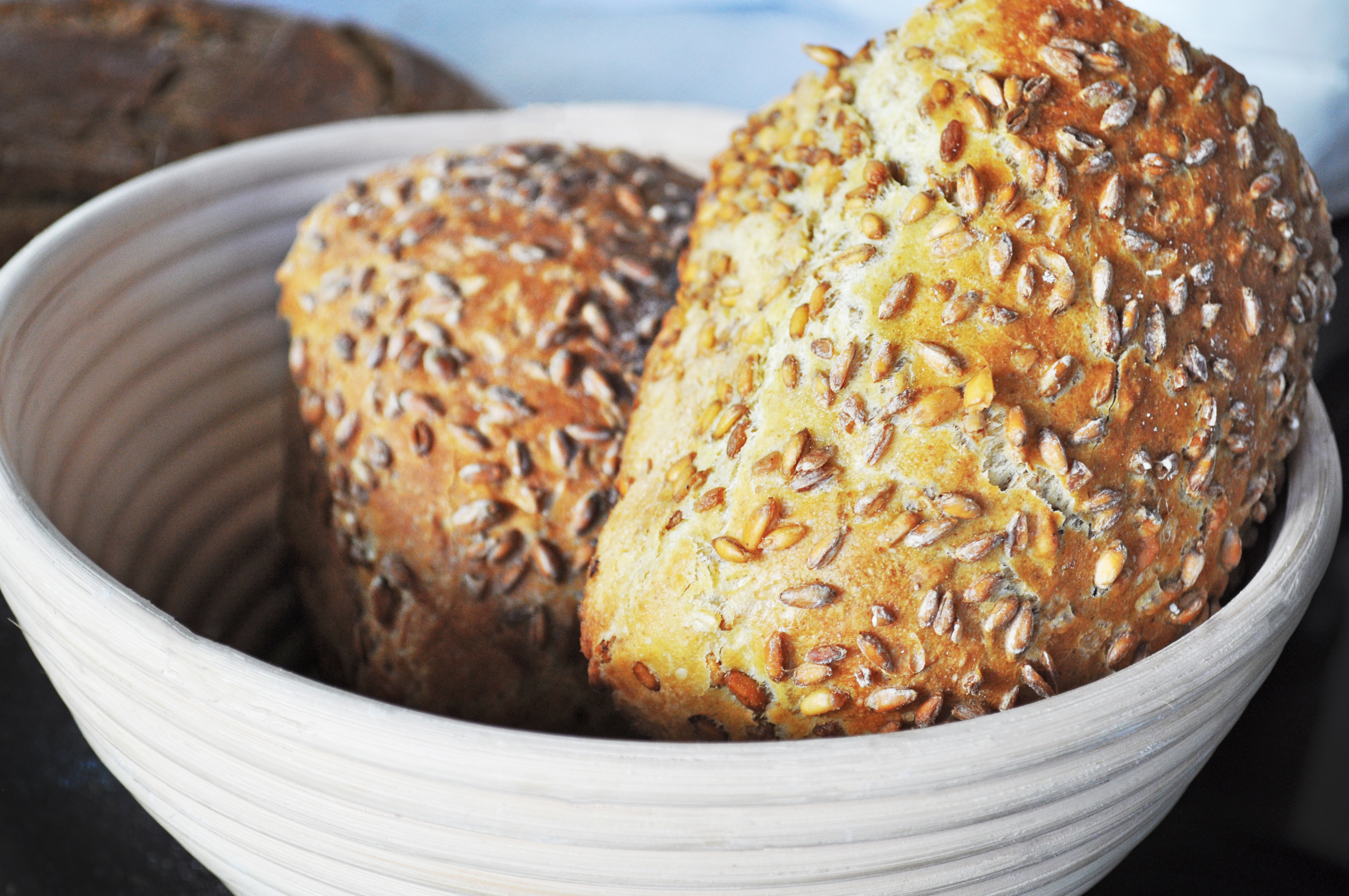 Produits